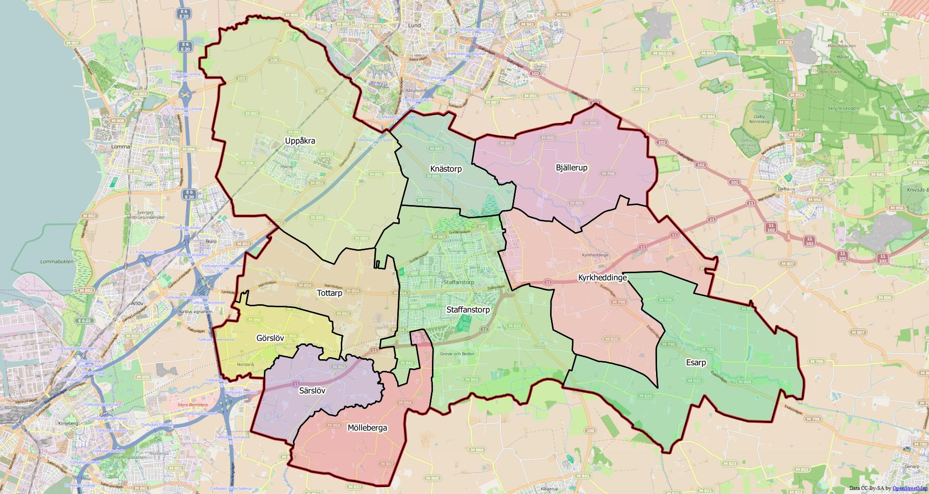 Distriktsindelningen i Staffanstorps kommun.